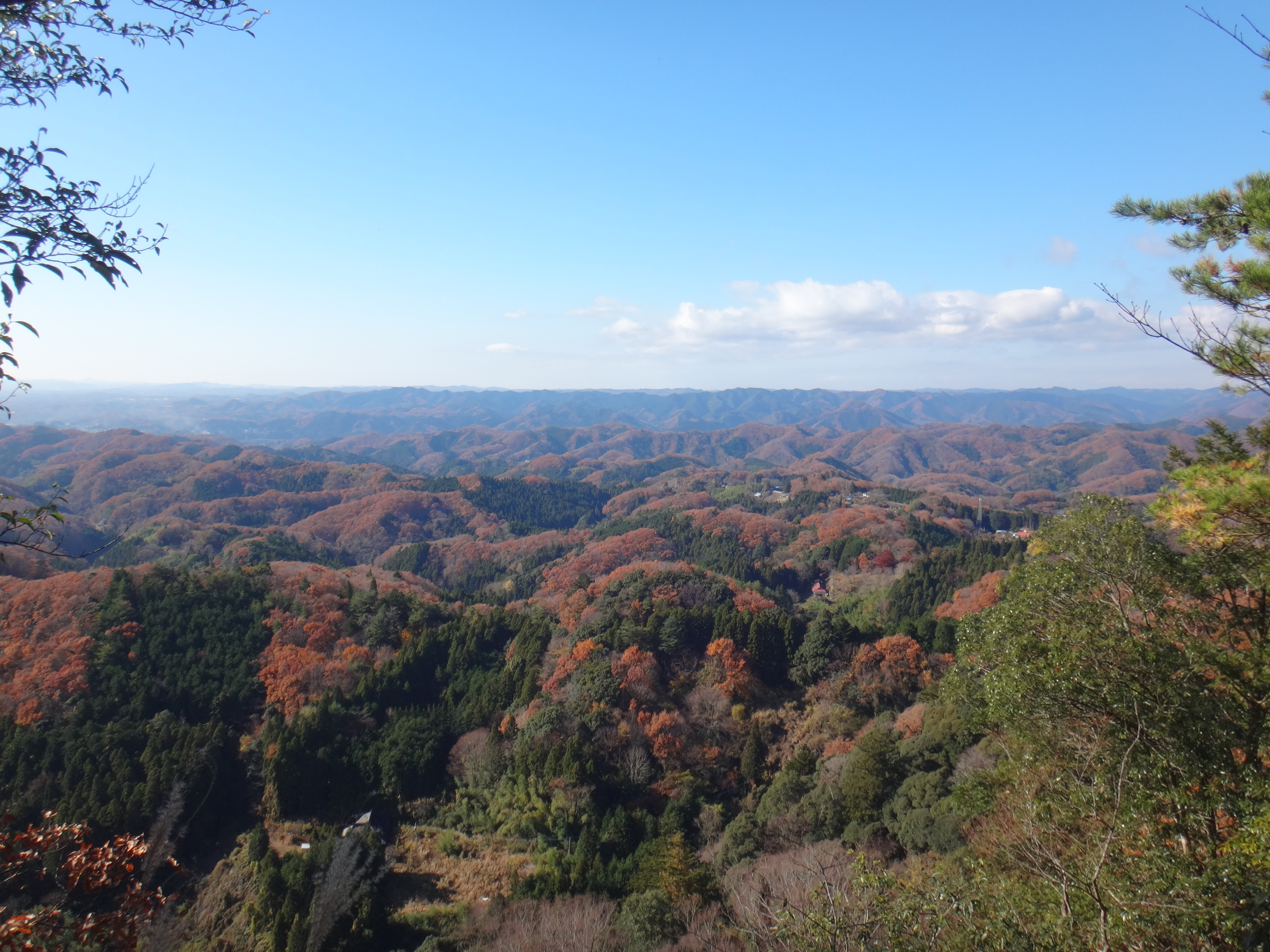 西金砂神社本殿からの展望